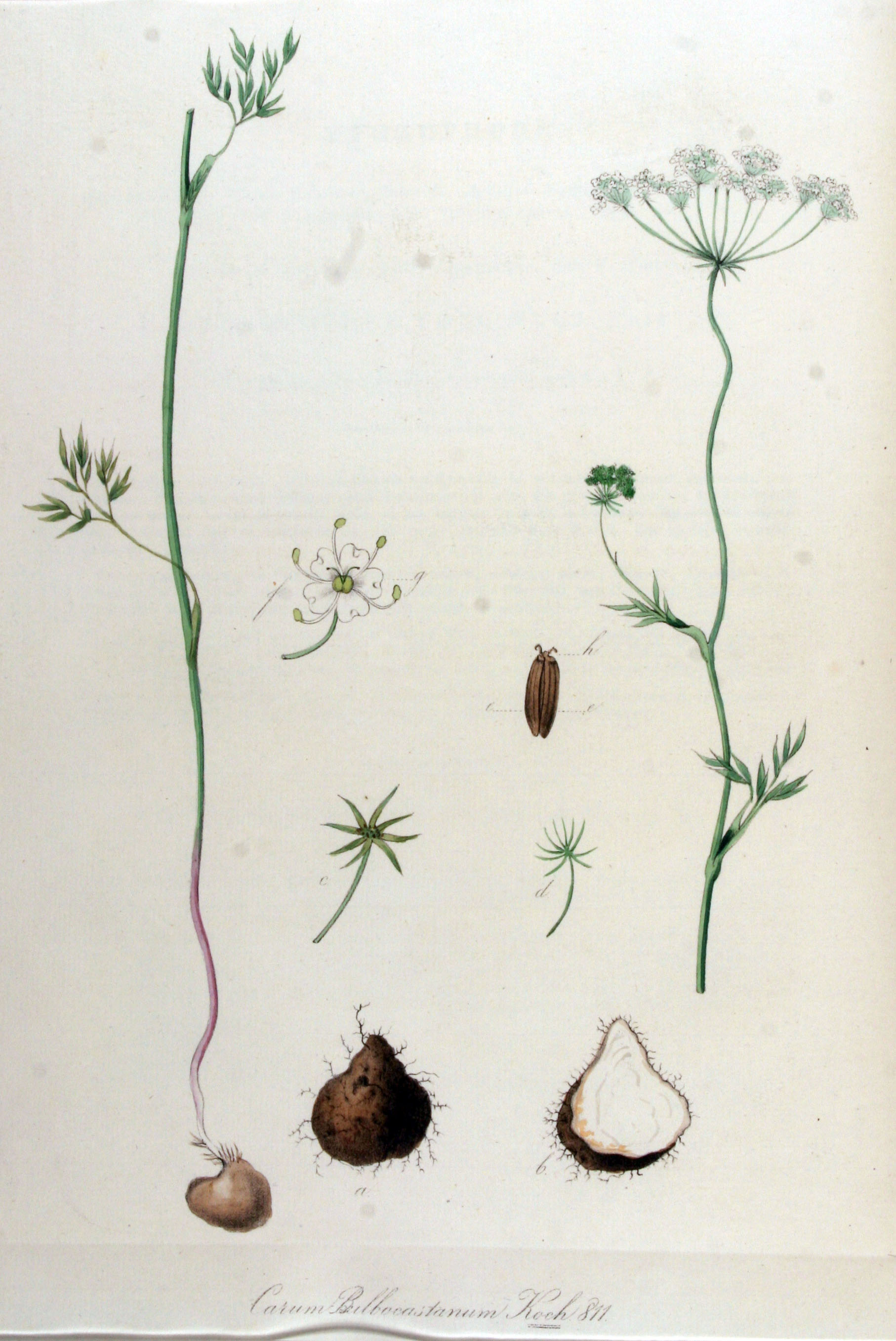 Bunium bulbocastanum L. (Syn. Carum bulbocastanum (L.) W.D.J. Koch)